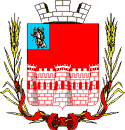 Варіант другого герба Звенигородки (Черкаська обл. Україна)